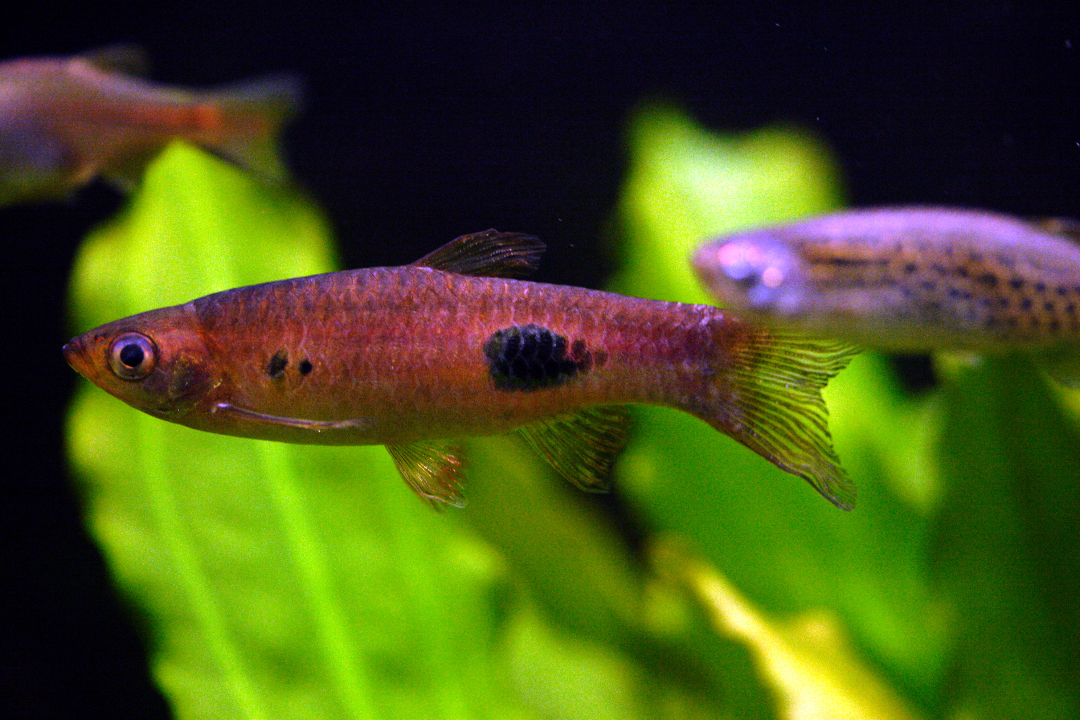 Schönflossenbärbling (Rasbora kalochroma)